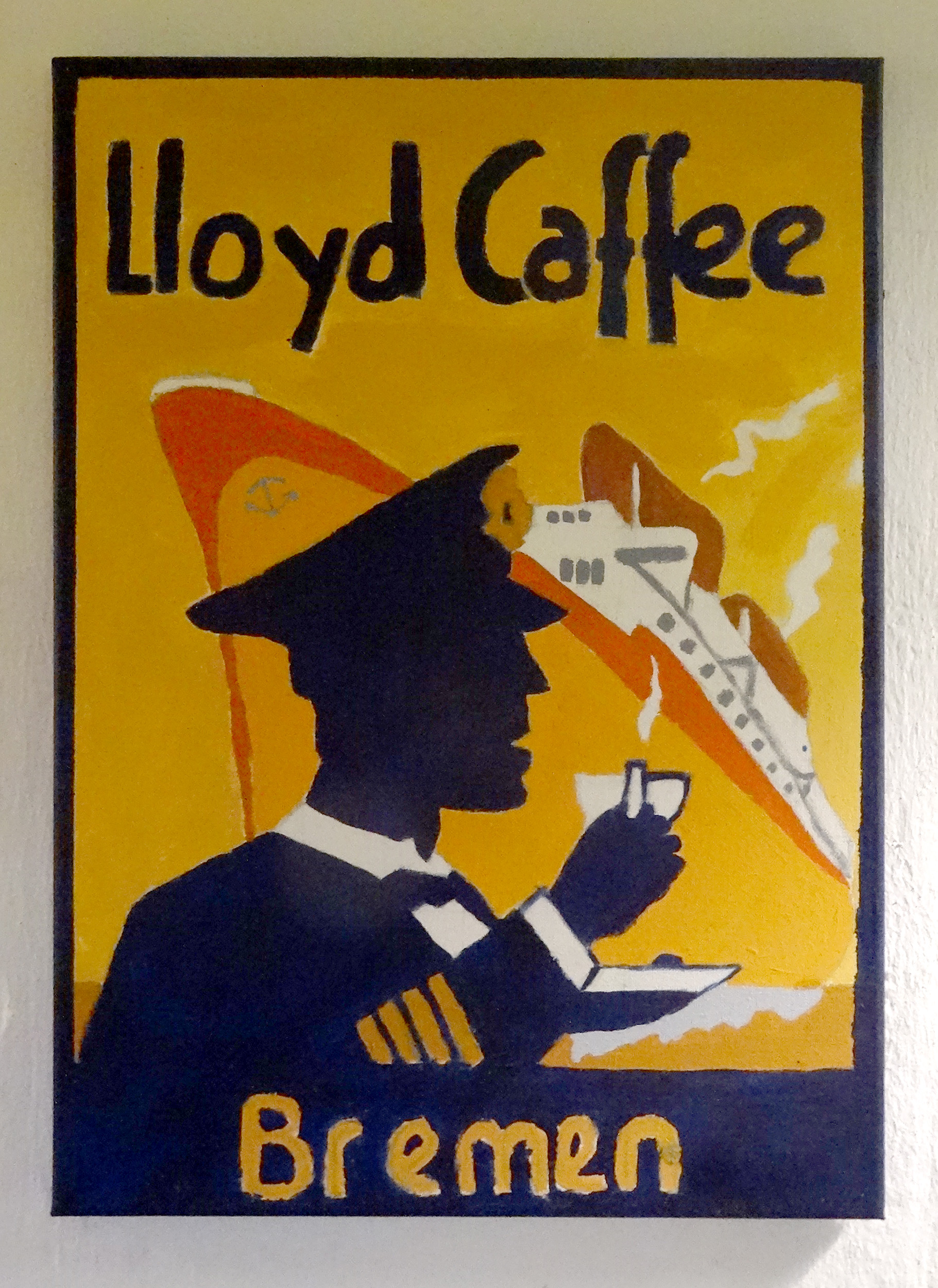 Lloyd Kaffeerösterei: alte Werbetafeln (Ausstellung im Café)